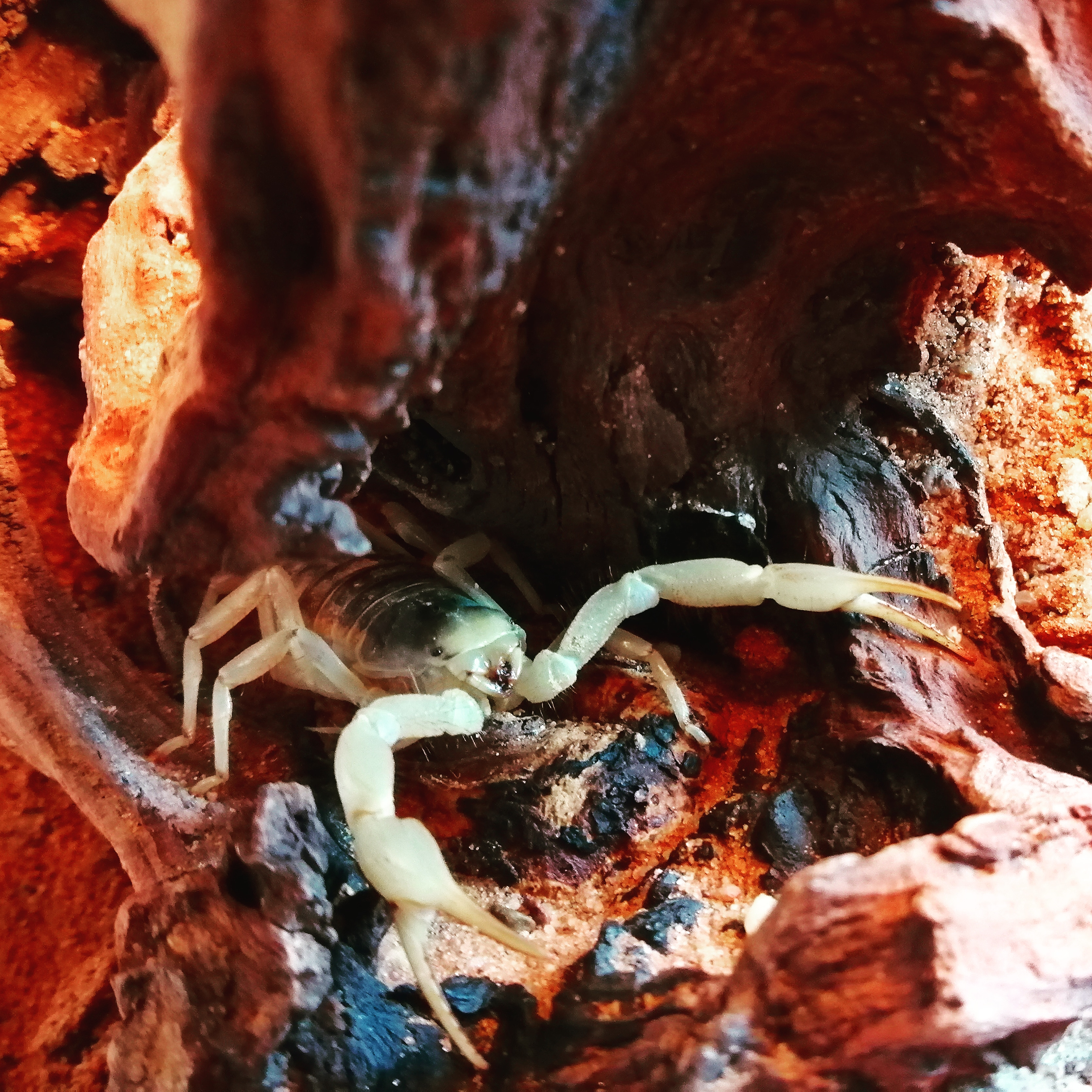 Hadrurus Arizonensis ruhend in einem Stück Wurzelholz. Deutlich erkennbar sind die vergleichsweise schlanken Pedipalpen. Hierauf sei insb. vor dem Hintergrund des häufig als Faustregel zur Einschätzung der Giftigkeit von Skorpionen herangezogenen Schwanz-Scheren-Verhältnisses hingewiesen. Hier ließe sich im Vergleich etwa mit Pandinus spp., Heterometrus spp. oder auch Tityus spp. durchaus eine höhe Giftigkeit annehmen, als sie tatsächlich gegeben ist. (private Terrarienhaltung, ca. 4cm Körperlänge)